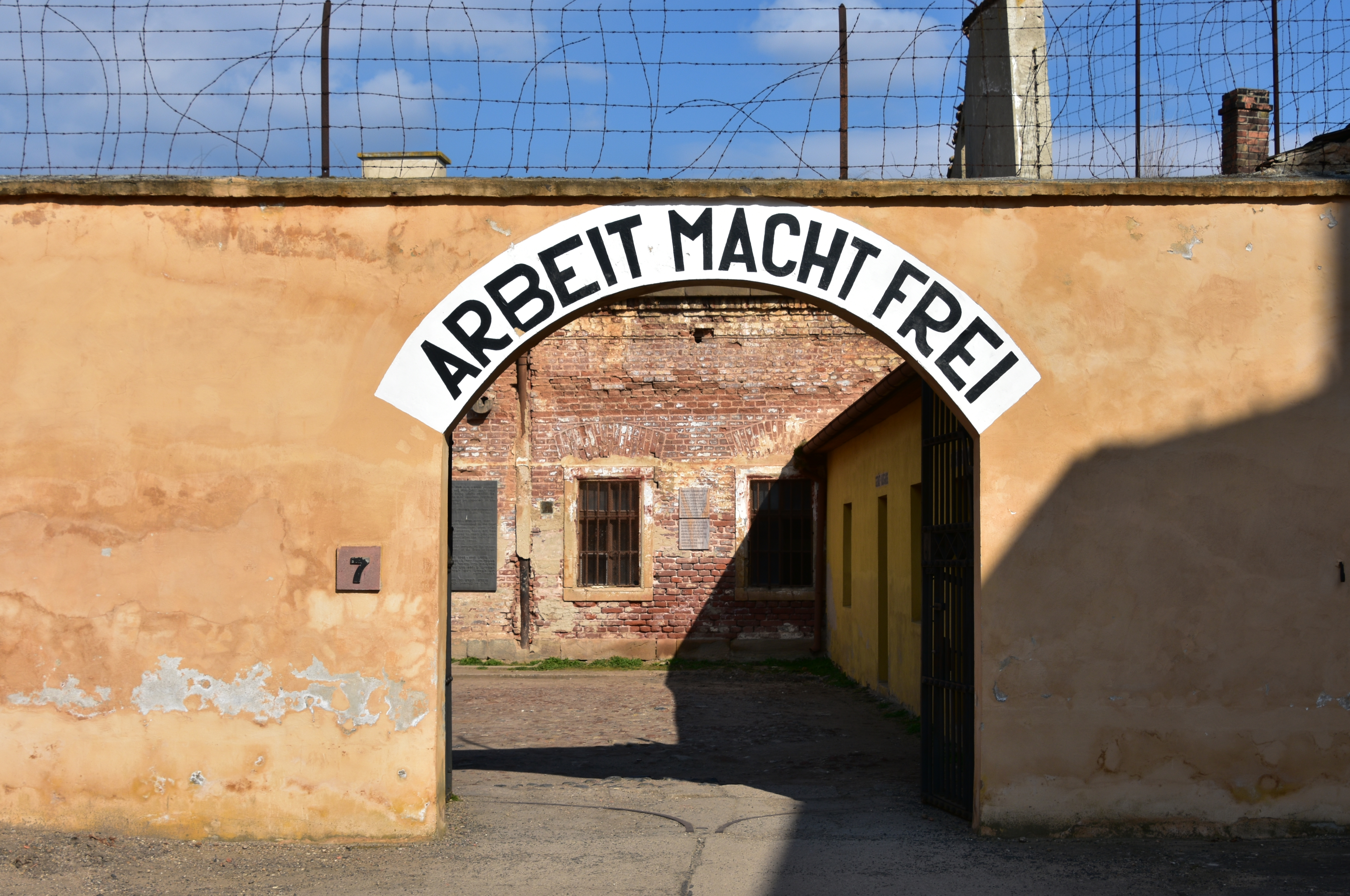 Terezin Nazi Concentration Camp (11)